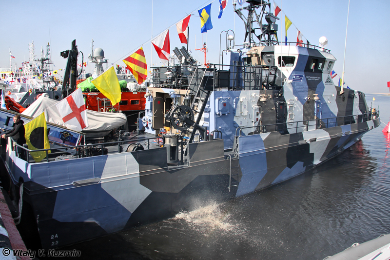 Противодиверсионный катер П-104 проекта 21980 Грачонок (P-104 project 21980 Grachonok class anti-diversionary ship)